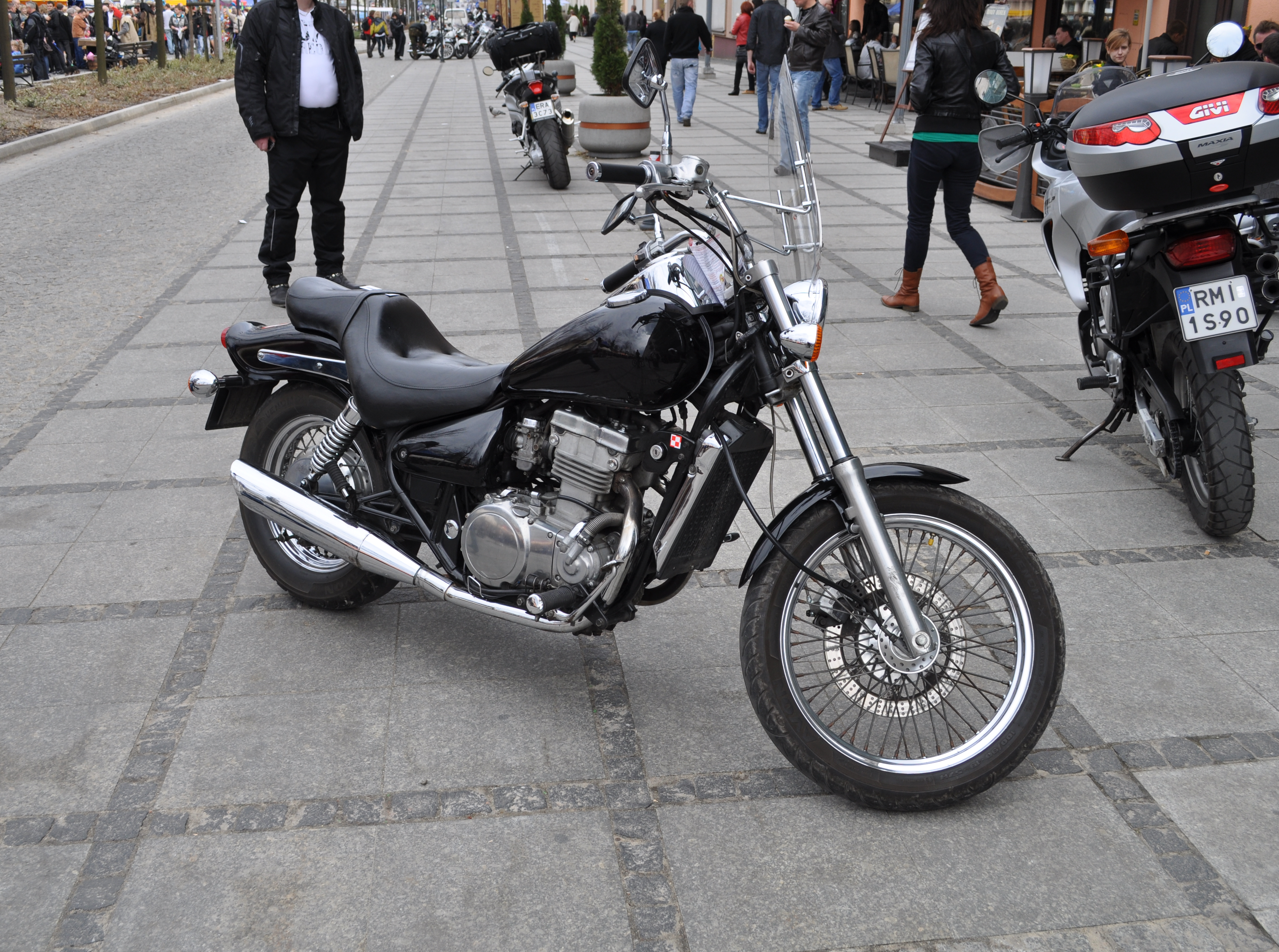 Rozpoczęcie sezonu motocyklowego w Częstochowie 2011